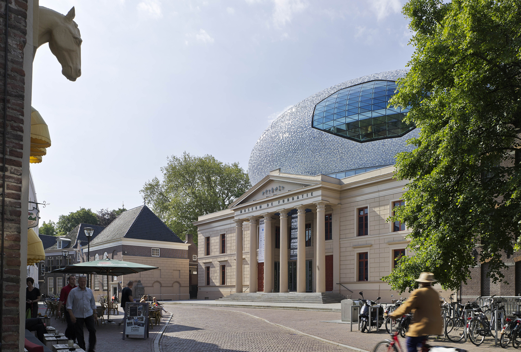 Uitbreiding Museum De Fundatie, Bierman Henket architecten, foto: Joep Jacobs